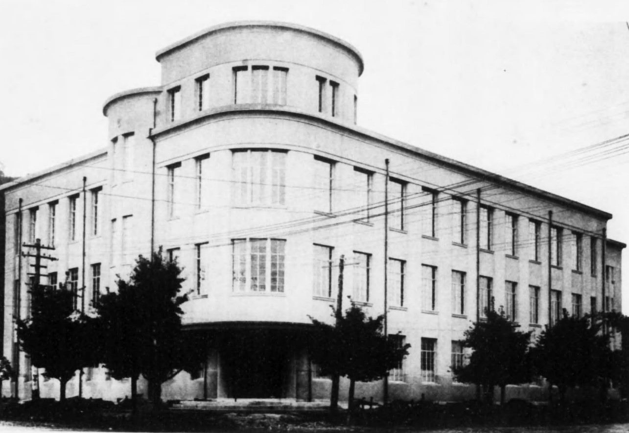 鹿児島県立図書館（2代目本館）の外観。現在の鹿児島県立博物館である。